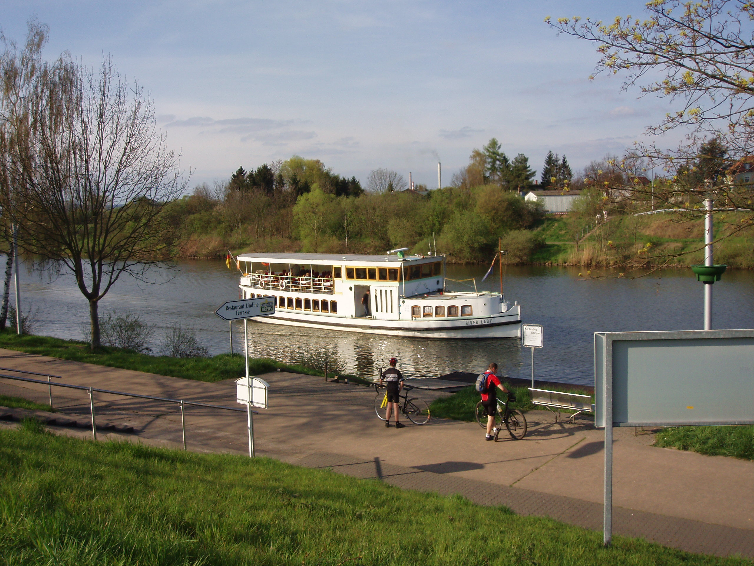 Fahrgastschifffahrt bei Saarlouis